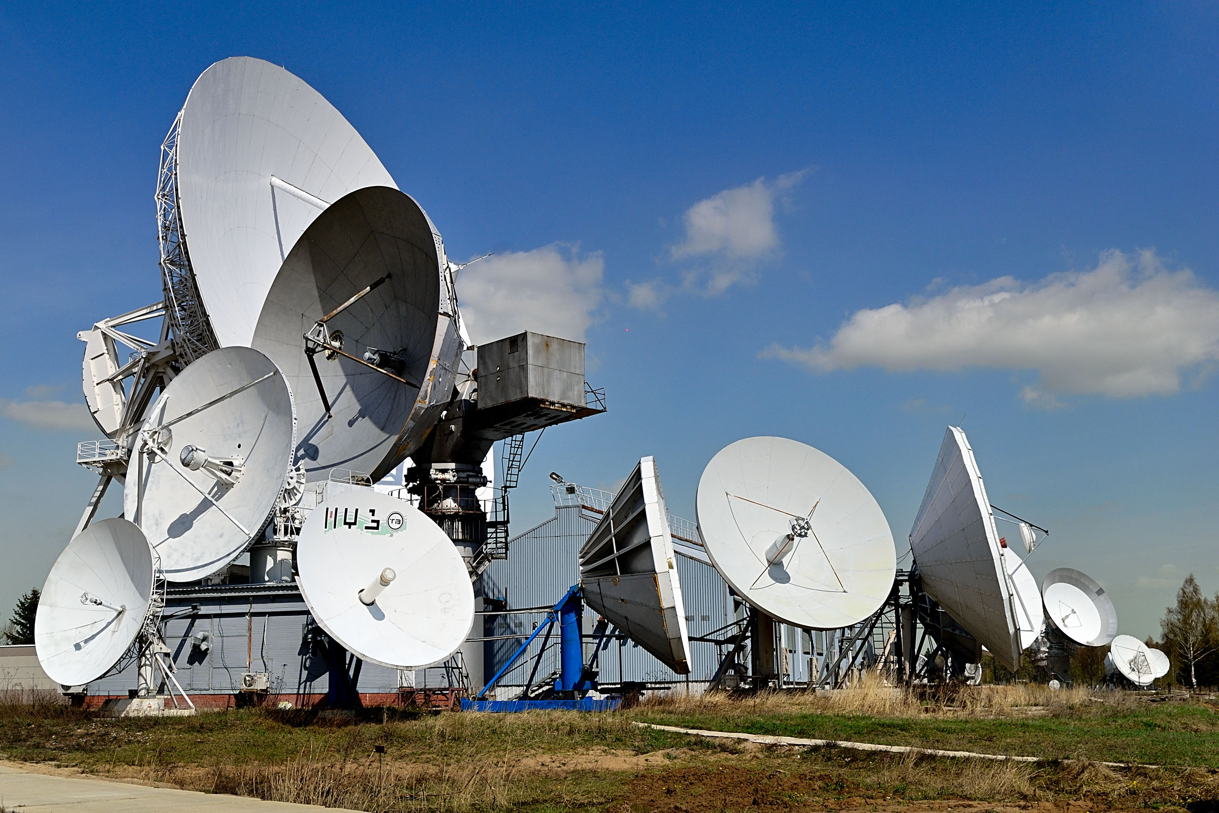 ЦКС Дубна